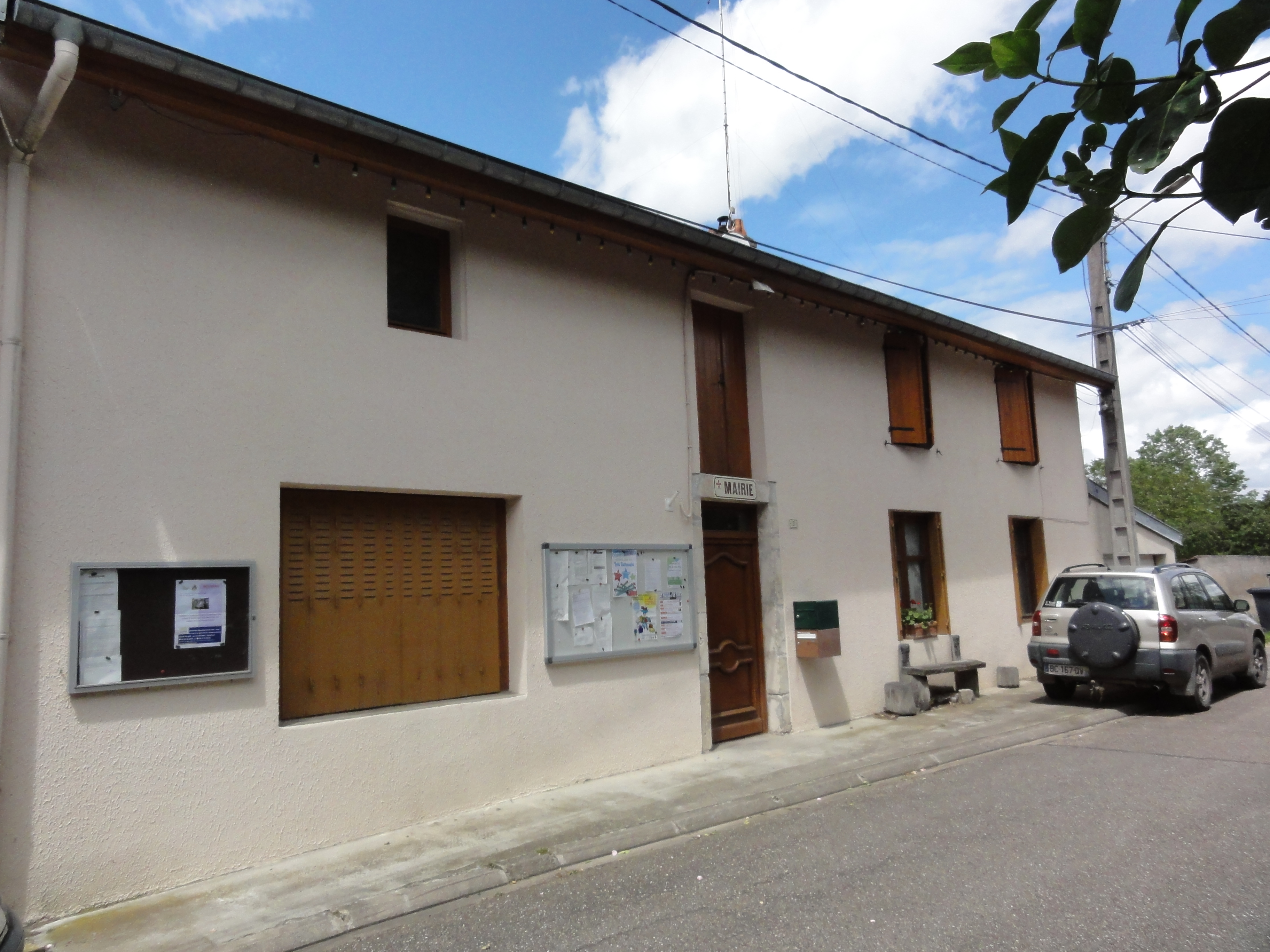 Coyviller (M-et-M) mairie